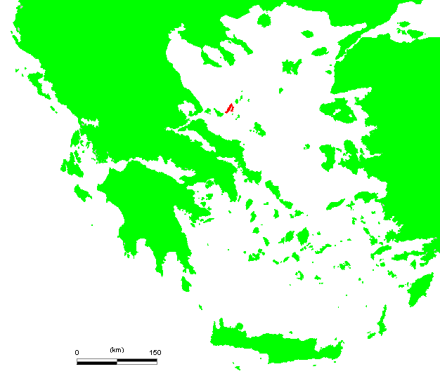 GR Alanissos.PNG (Greek island)